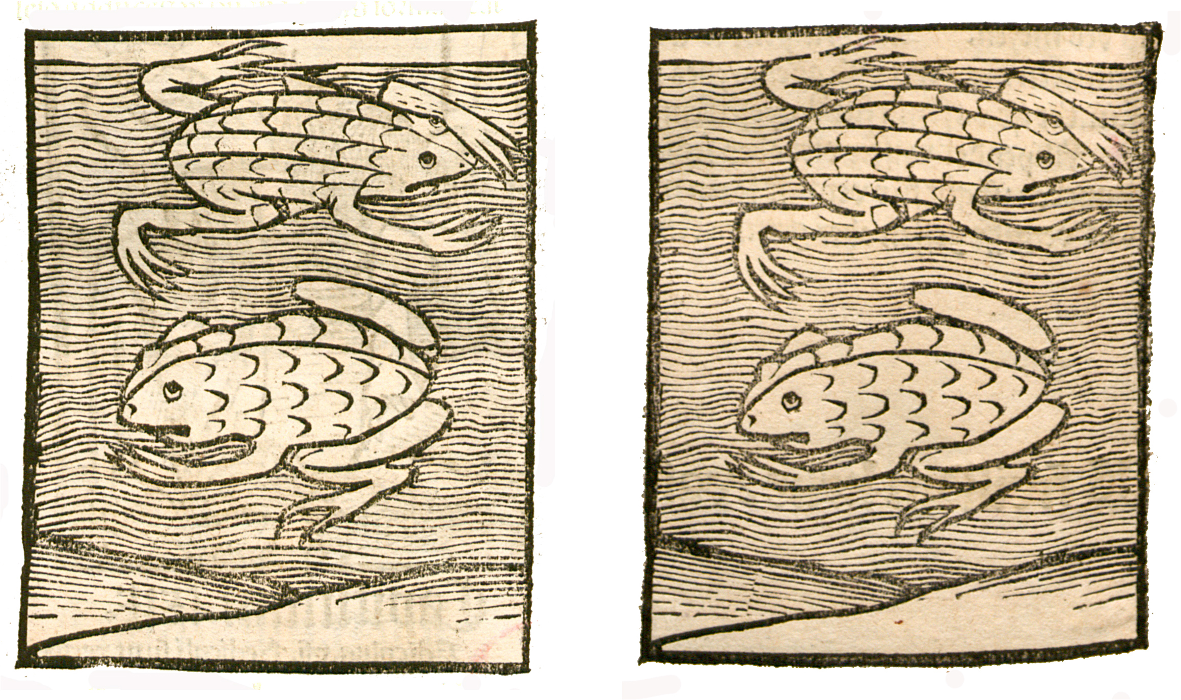 Abbildung zum Kapitel Frösch (Rana)